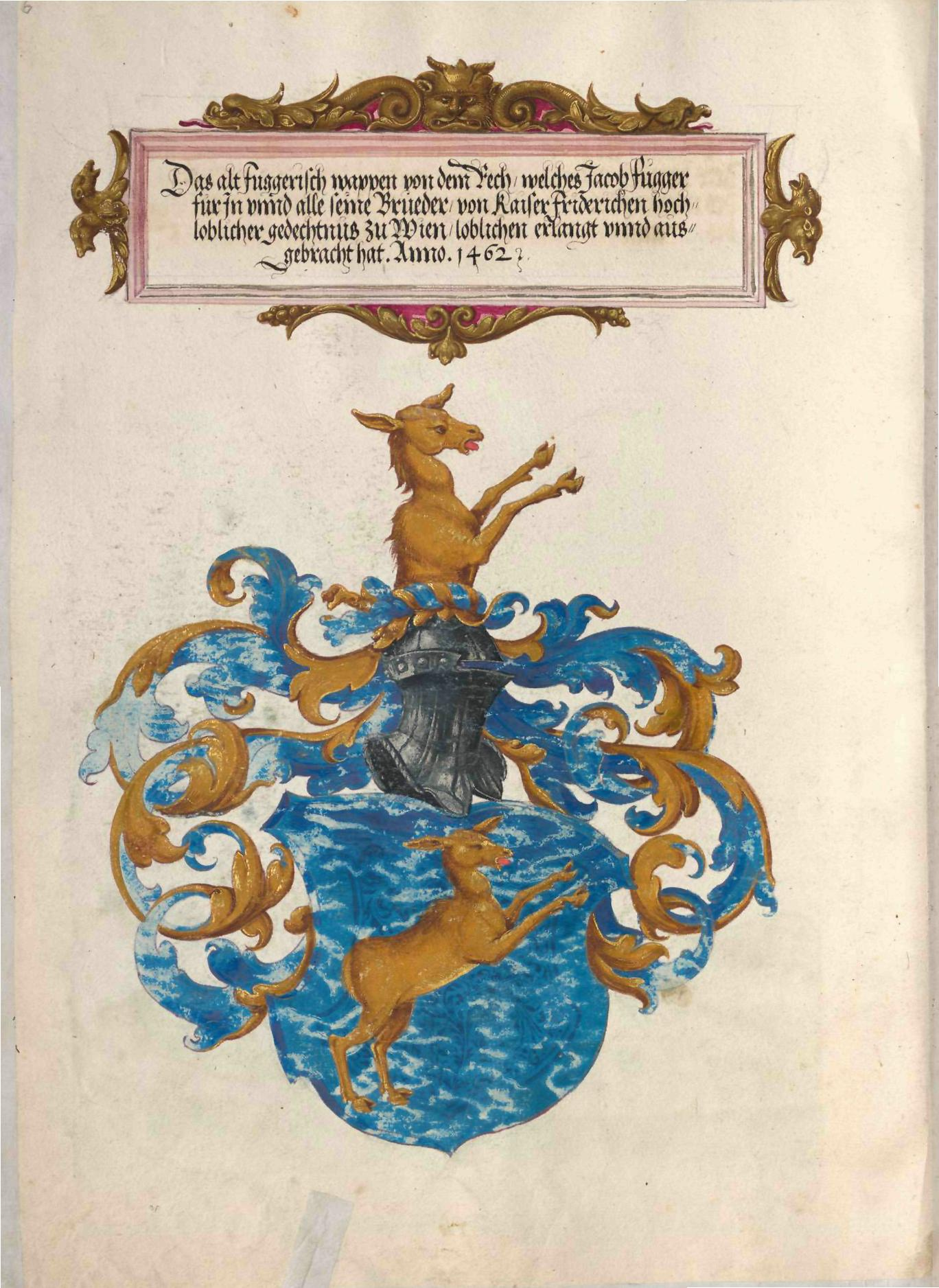 Geheimes Ehrenbuch der Fugger, hergestellt in der Werkstatt Jörg Breu d. J., 1545–1549 Wappendarstellung Fugger vom Reh